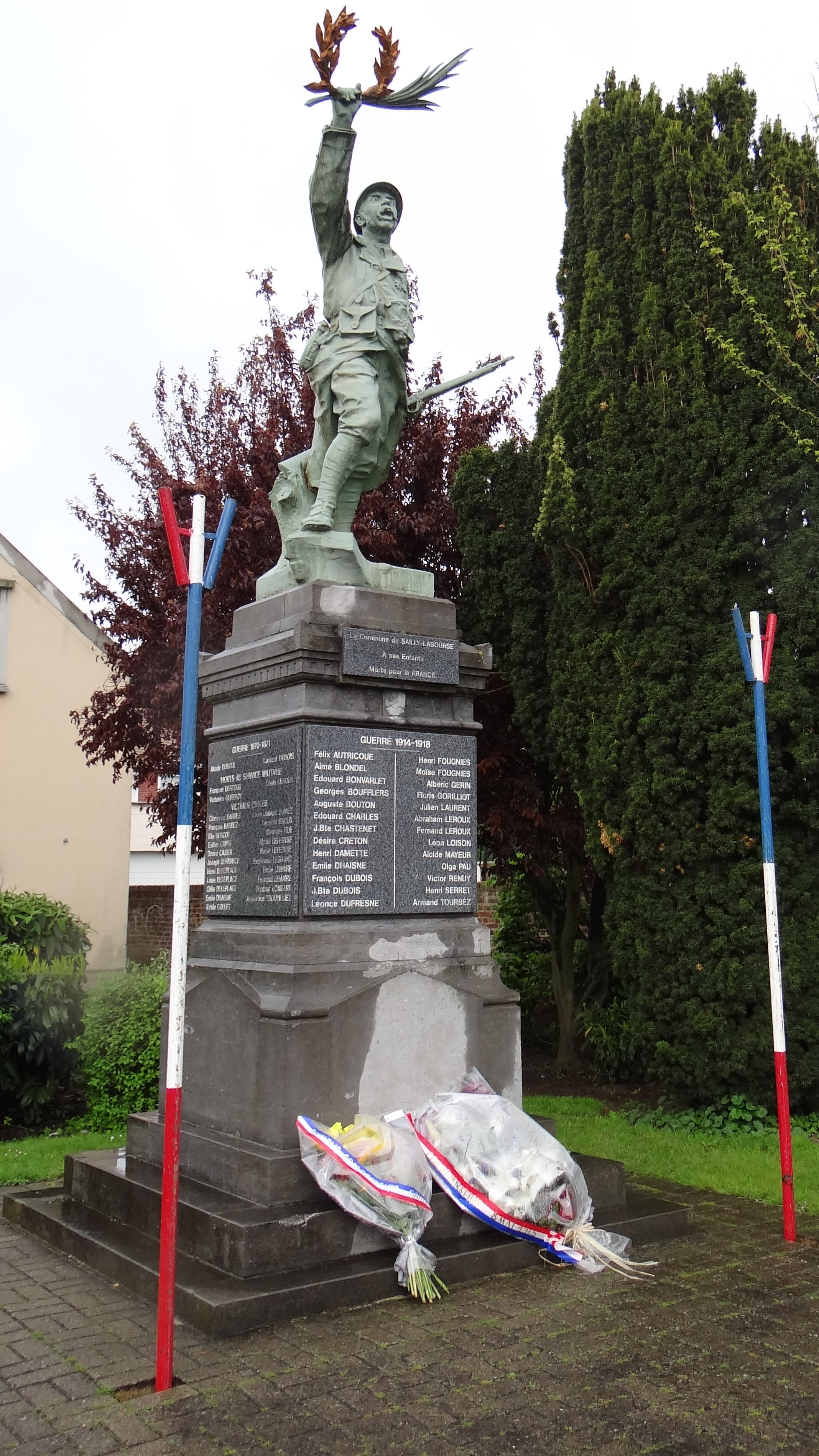 Sailly la Bourse - Monument aux Morts